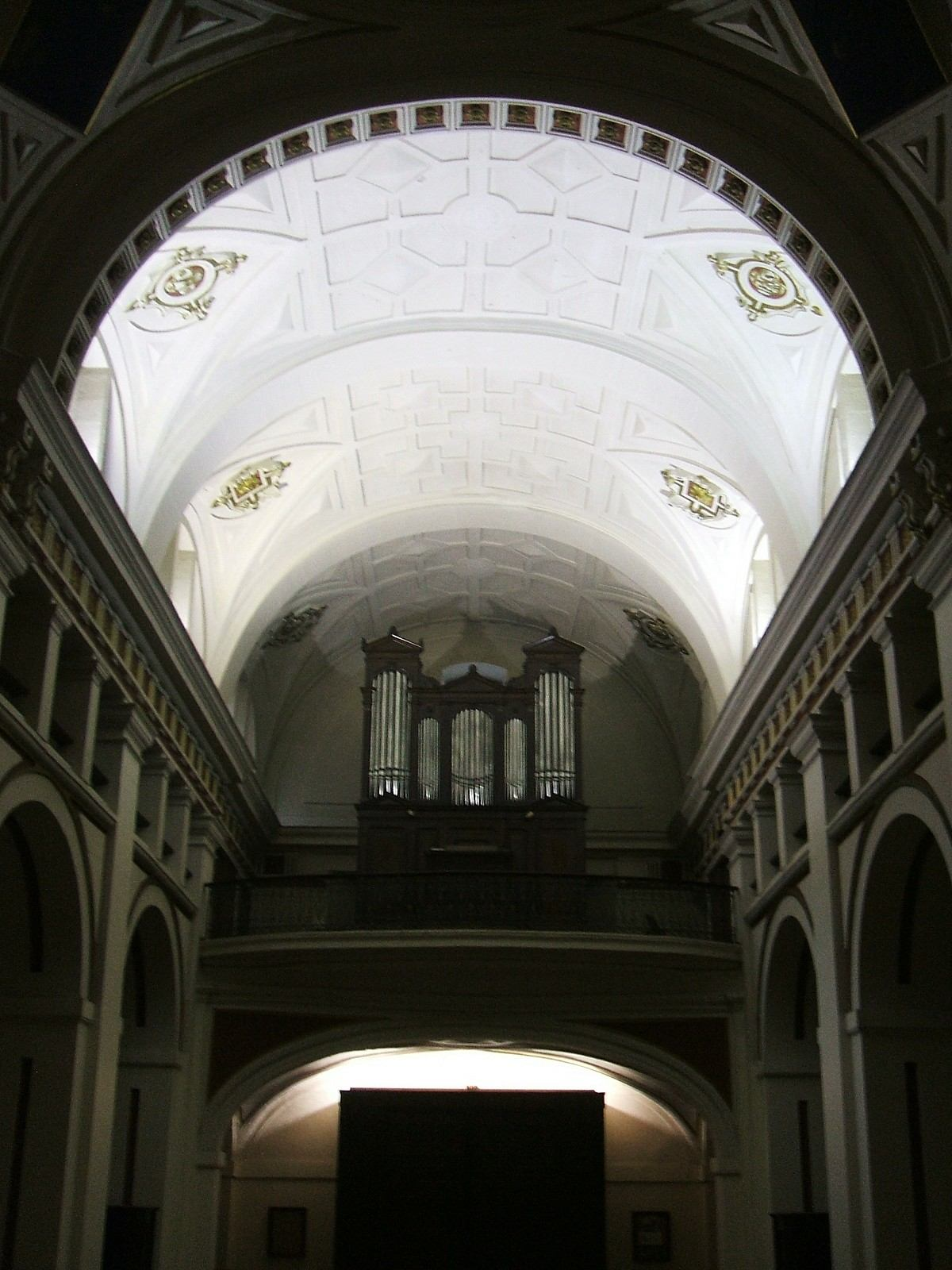 Bóveda de la nave central de la Iglesia de los Santos Juanes, Bilbao